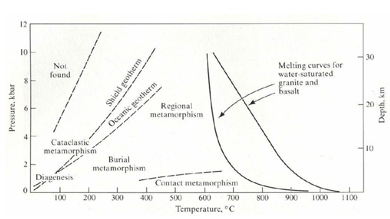 ภาพแสดงชนิดการแปรสภาพ ตามอุณหภูมิและความดัน